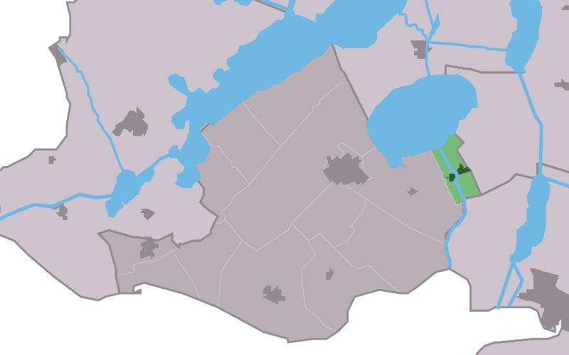 Kaartsje fan himrik fan Sleat